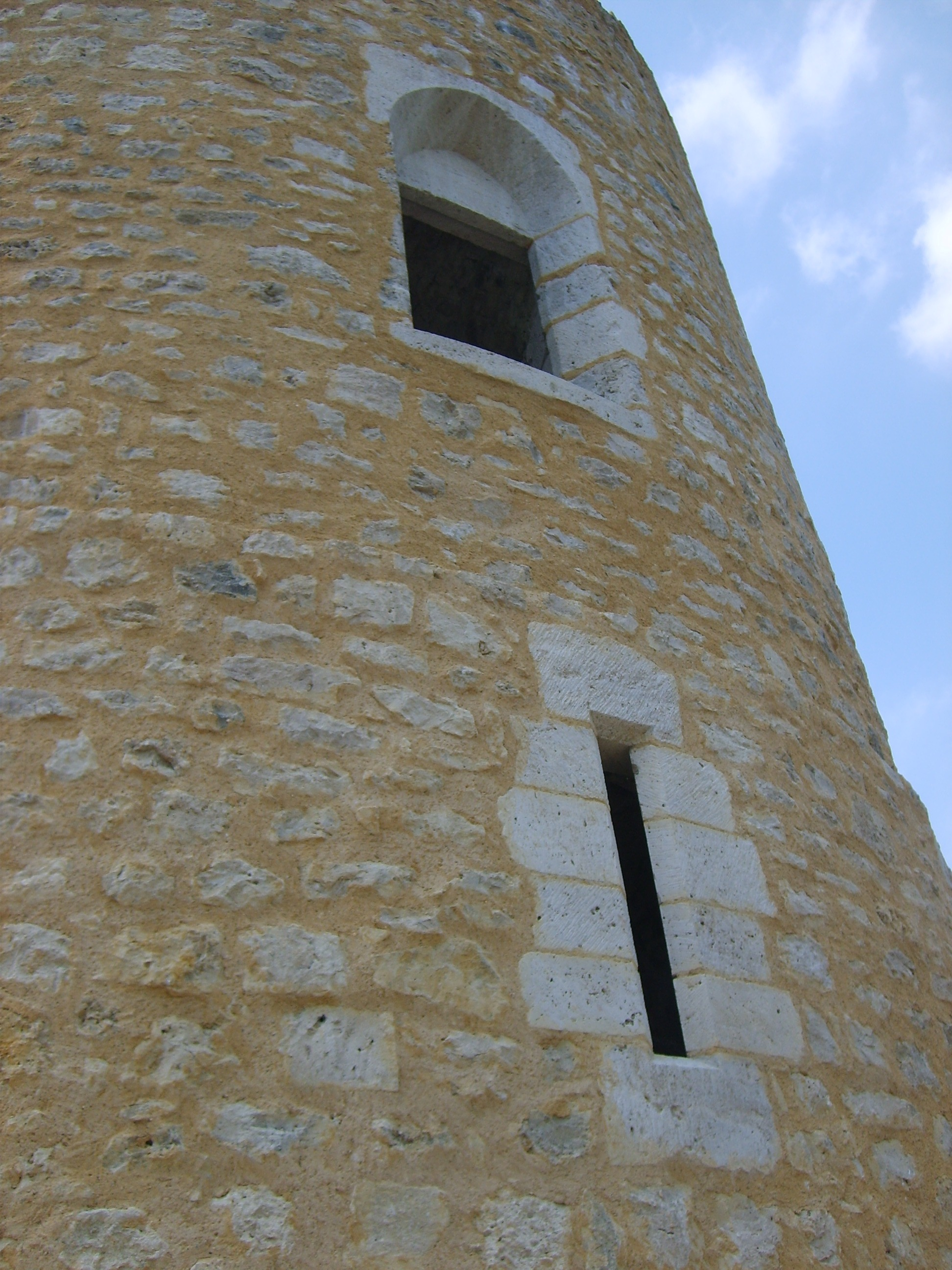 Tour Est du Château de Brie-Comte-Robert